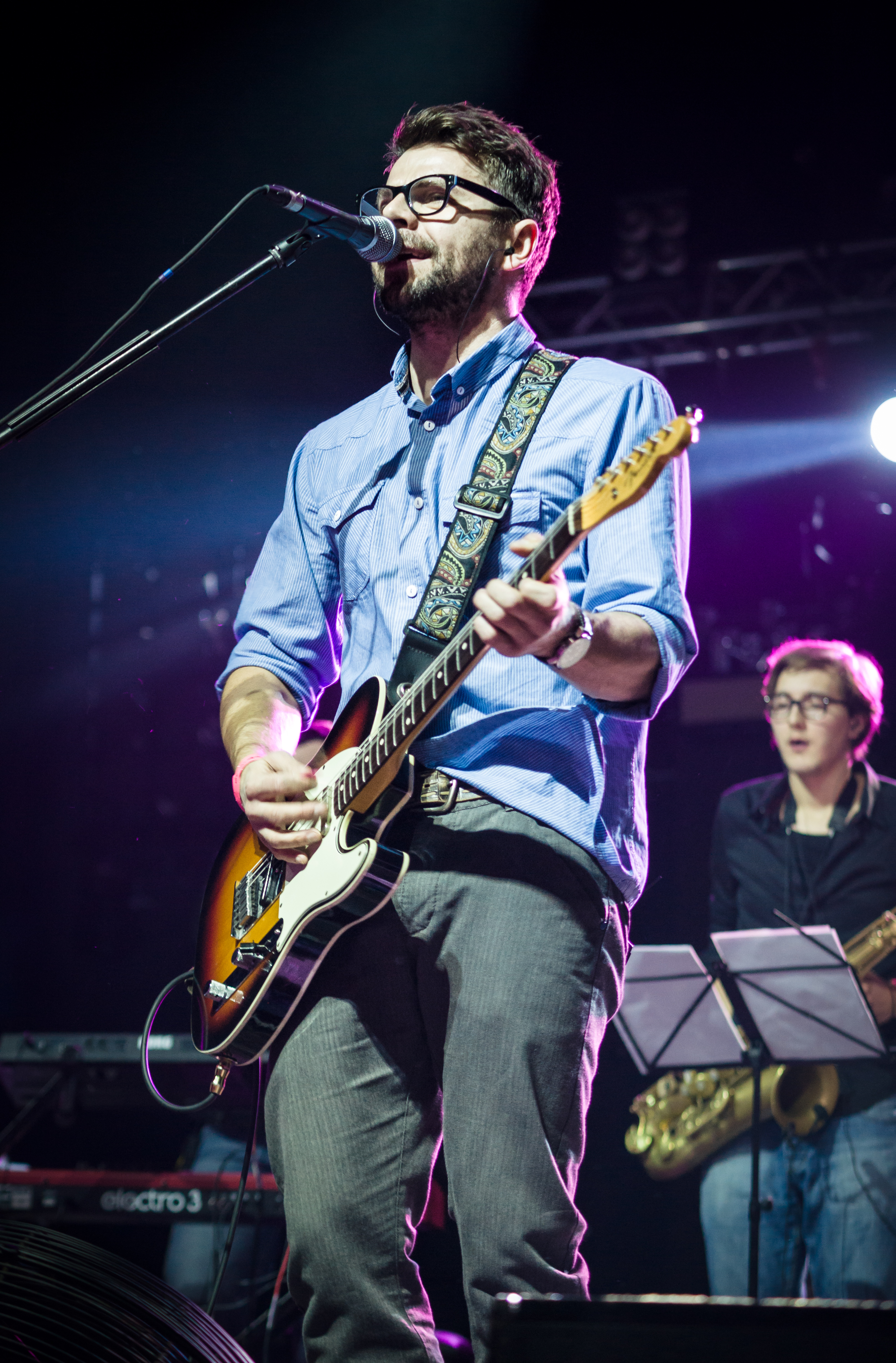 Jakub Kawalec "Quka", wokalista zespołu happysad podczas Rocket Festiwal 2013 w Warszawie.